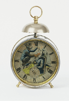 Wecker. Mit dem Beginn des Industriezeitalters ein gefragter Artikel in der Schwarzwälder Uhrenproduktion. 1905 wurde die gesamte produzierte Stückzahl an Weckeruhren auf 4,1 Millionen Stück geschätzt (70,7 % der Gesamt-Uhrenproduktion). Gängigste Typen waren die so genannten Babywecker mit rundem Metallkorpus und aufgesetzter Glocke. Sie galten zwischen 1890 und 1930 als die Weckeruhr schlechthin.